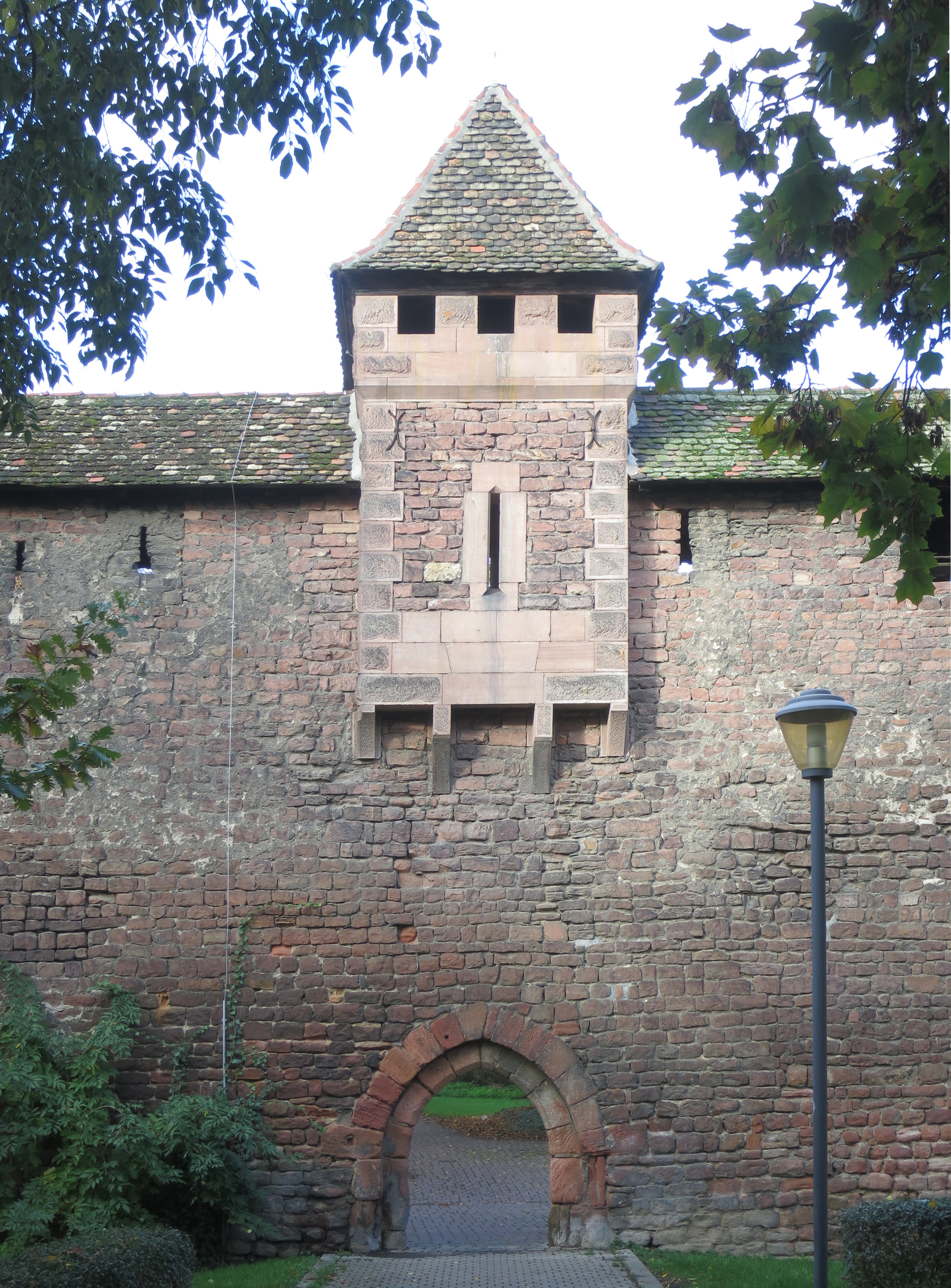 Fischerpförtchen, Worms